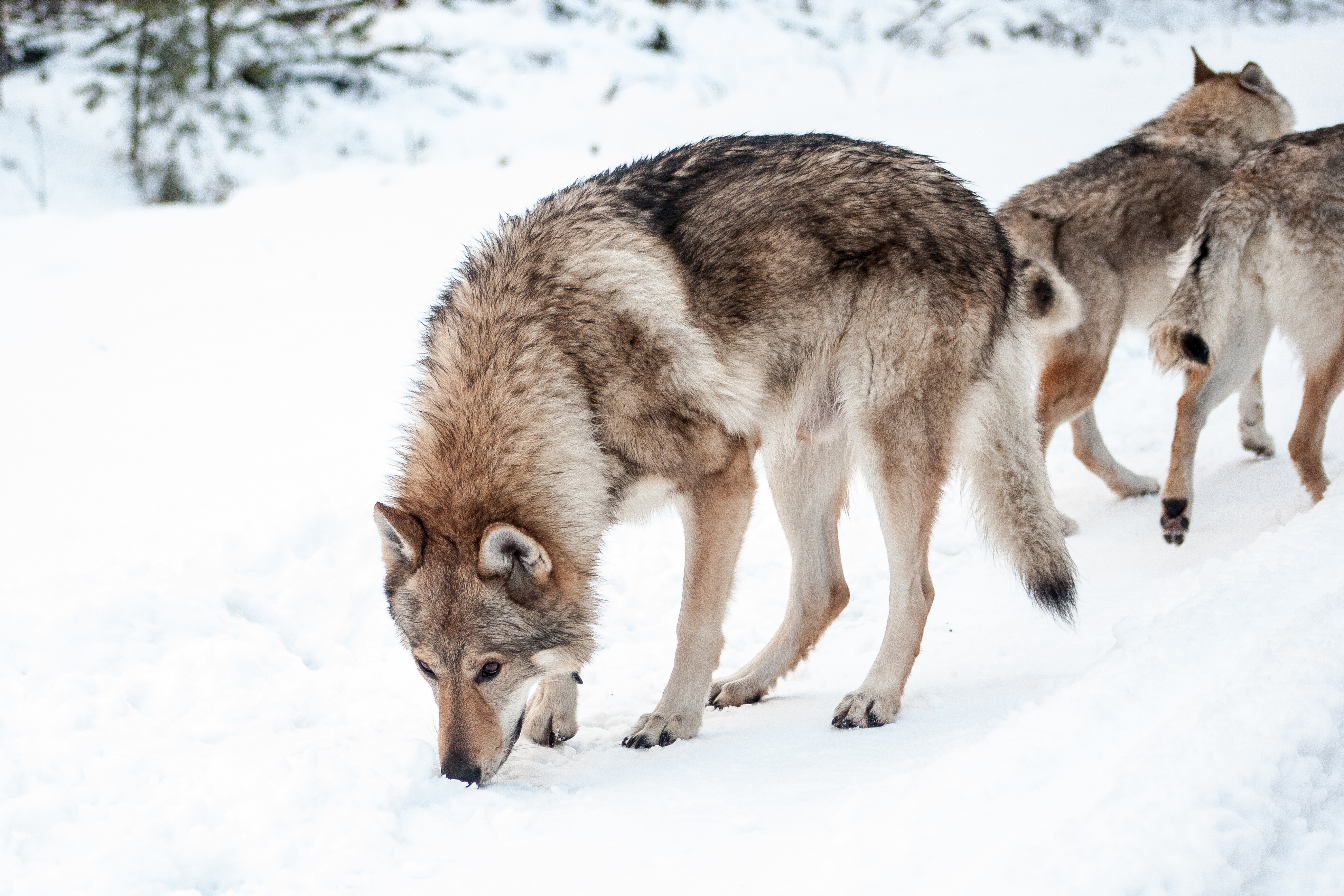 Ceskolsovensky Vlciak Czambor z Vlciho dubu 11 old